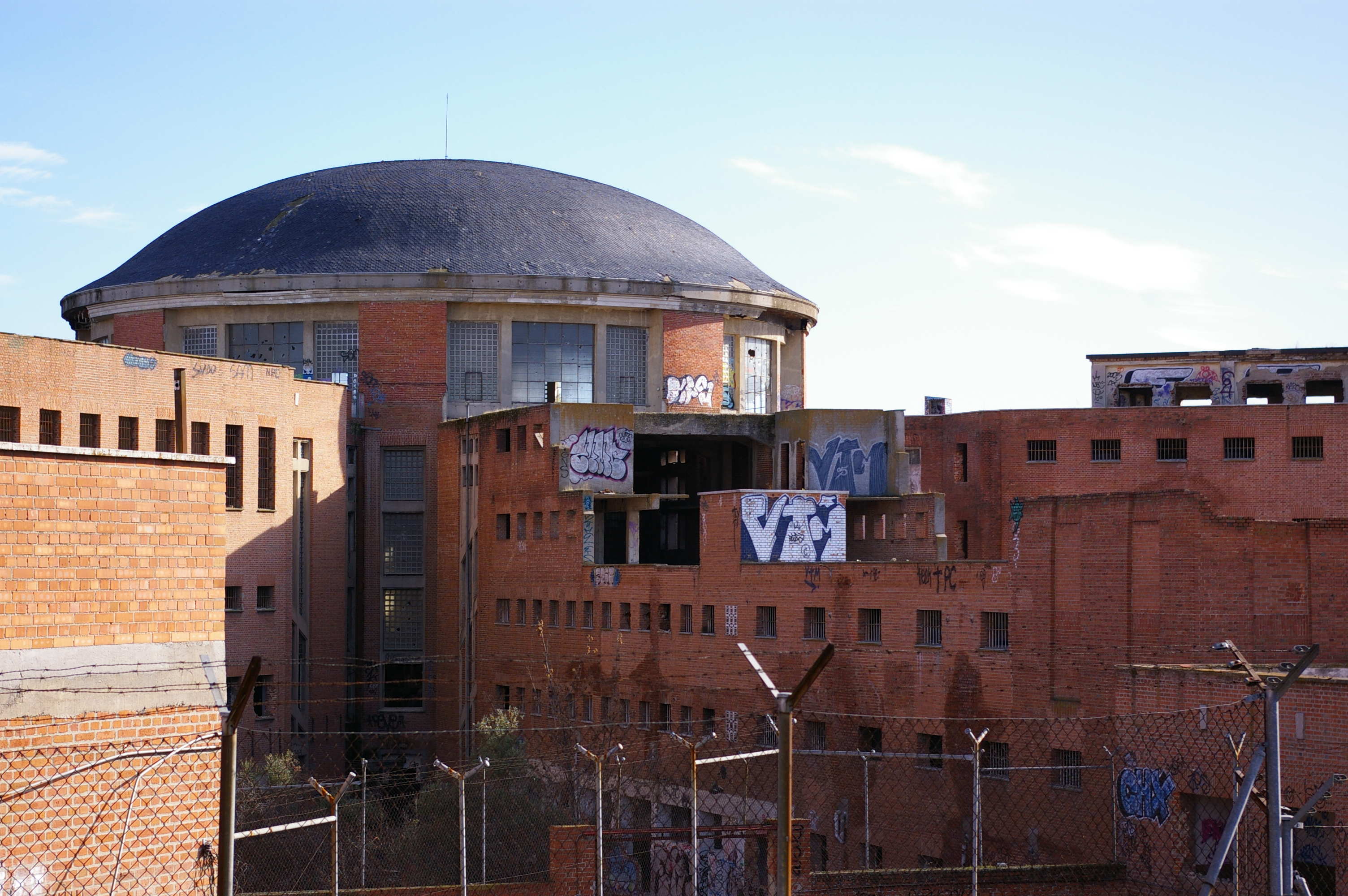 12.1.07 Cárcel de Carabanchel: de la represión al olvido